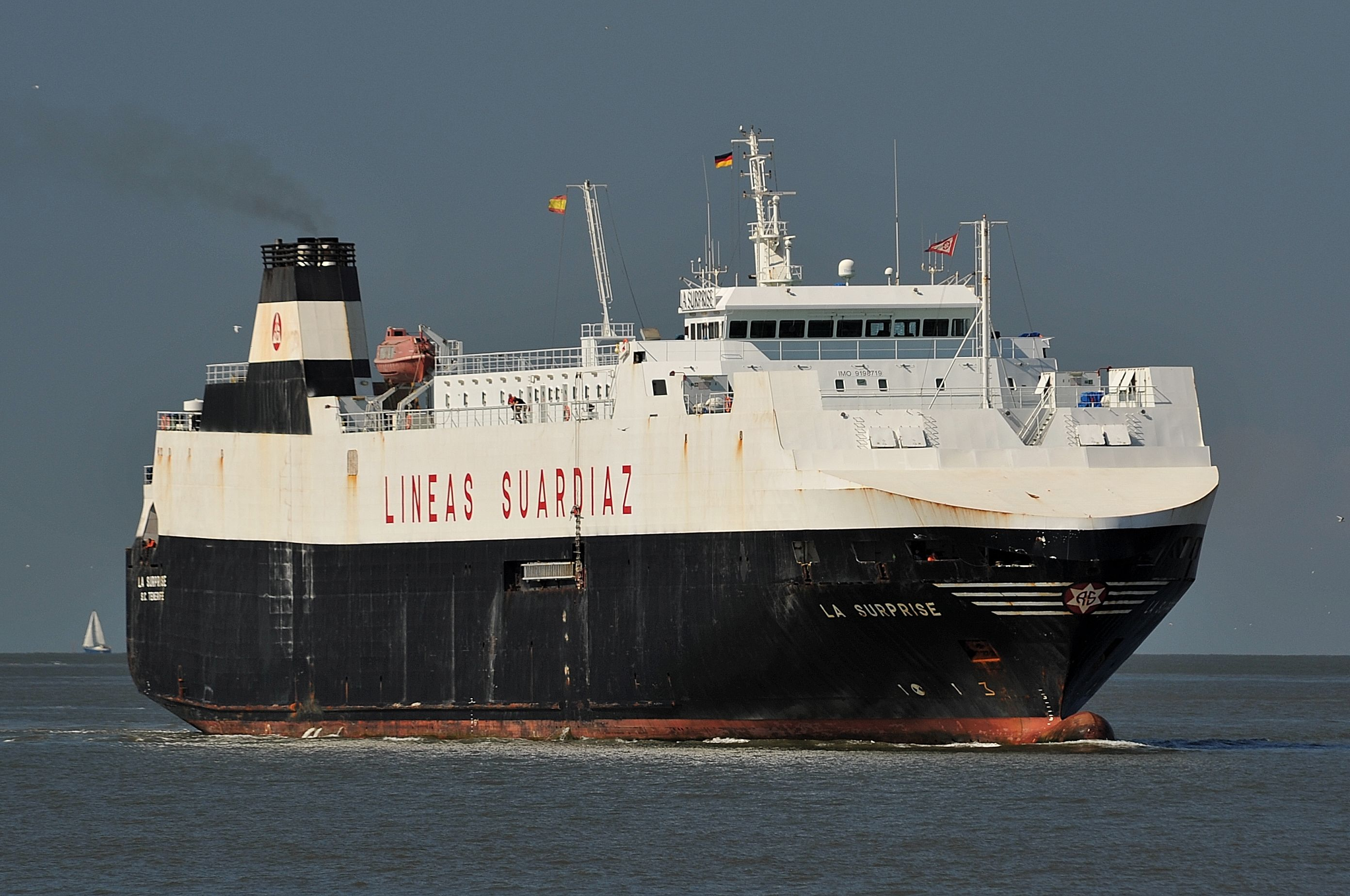 Von See kommend vor Cuxhaven in richtung Hamburg